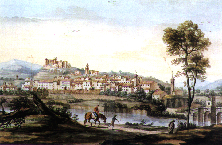 Tableau de Mazzuoli des Terres de Castrocaro Terme